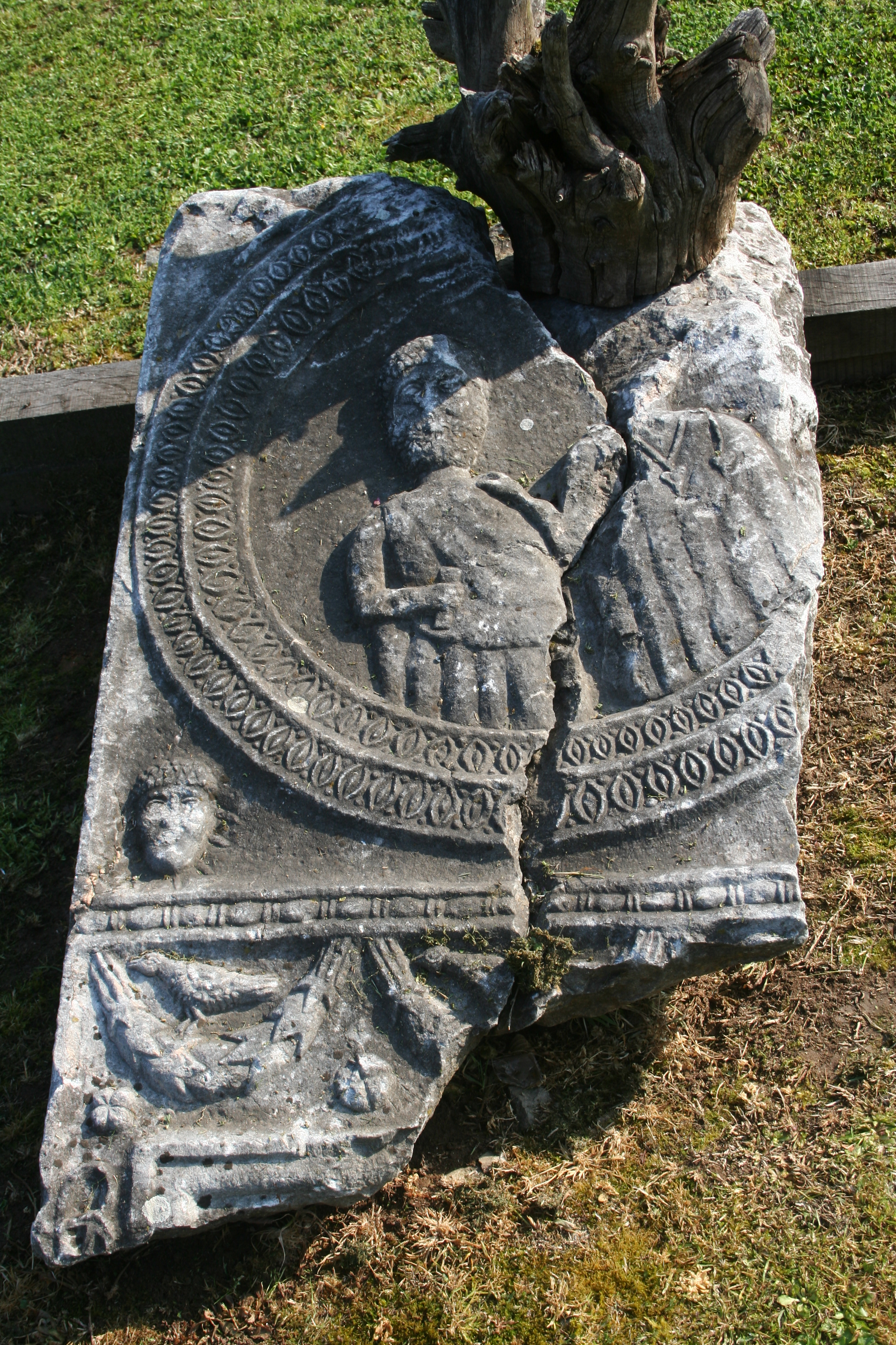 Etno selo Vrhpolje